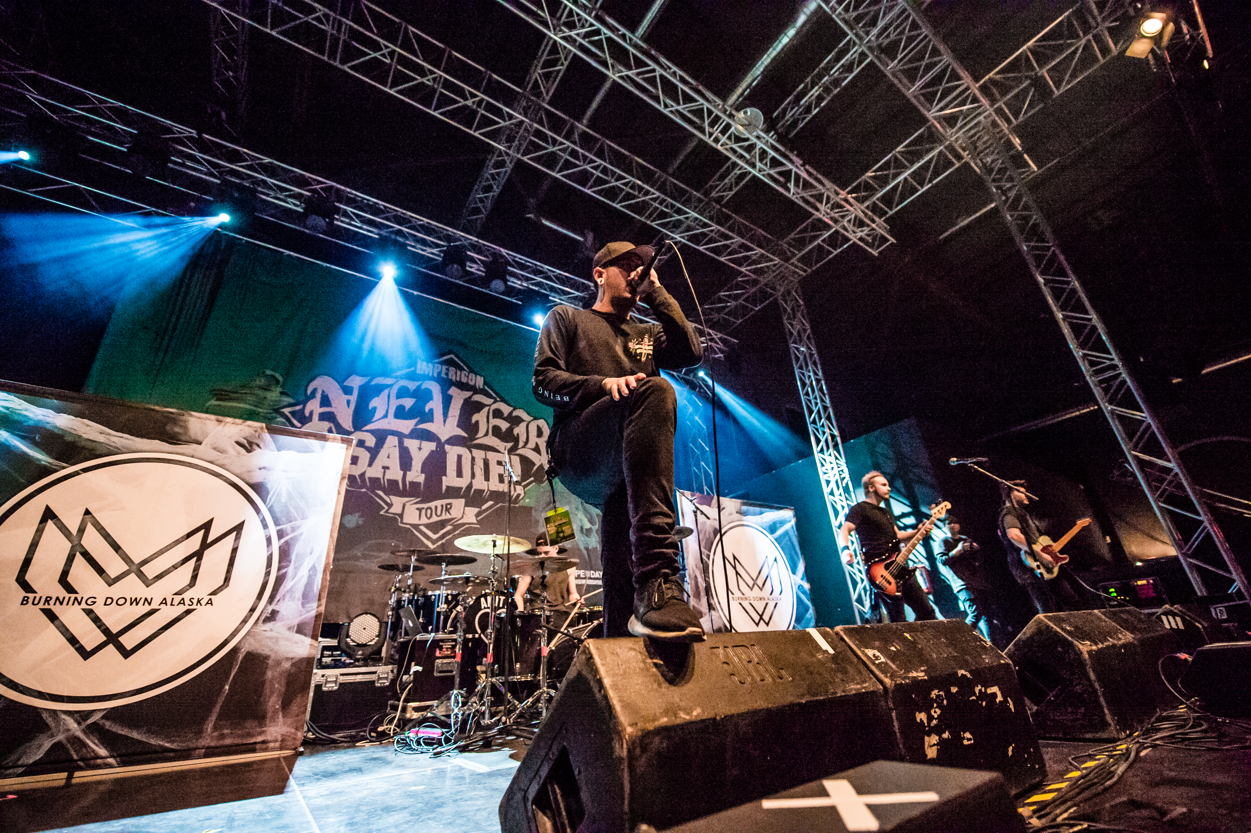 'Burning Down Alaska - Impericon Never Say DIE! - Oberhausen'